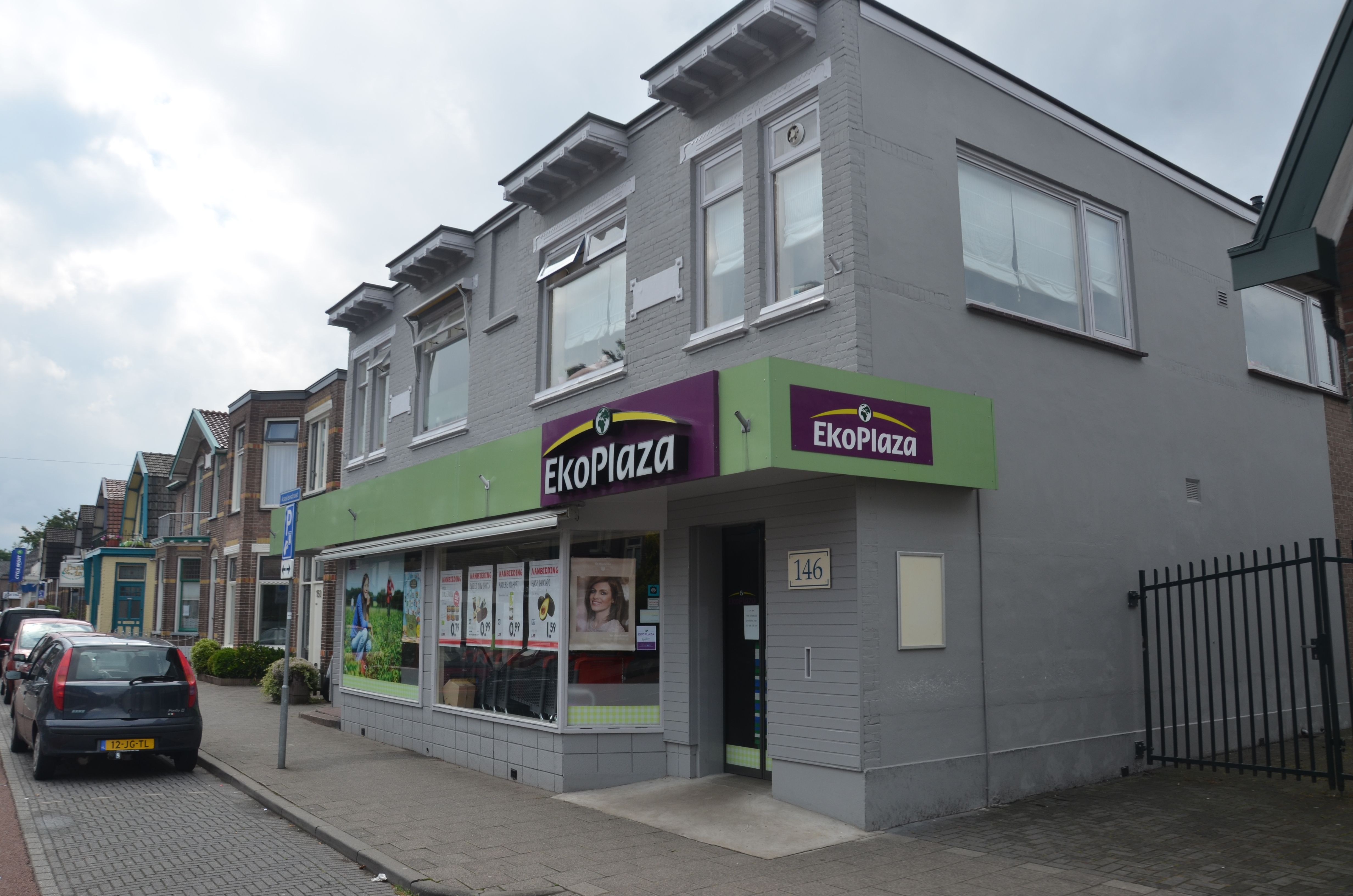 De Ekoplaza in Apeldoorn.